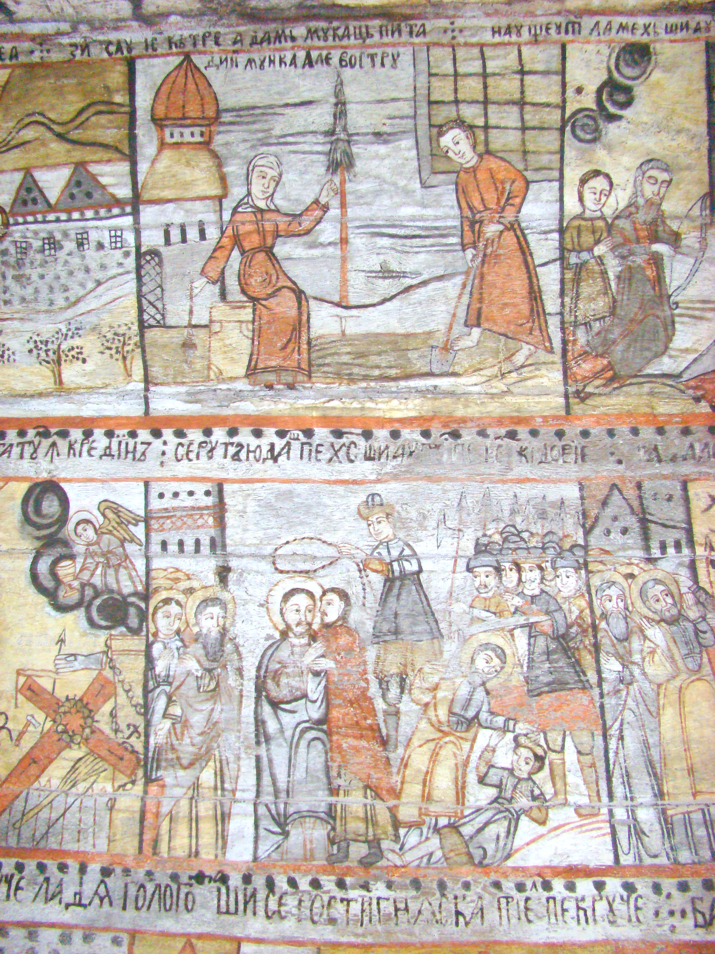 Biserica de lemn „Nașterea Maicii Domnului” din Călinești-Căeni, județul Maramureș